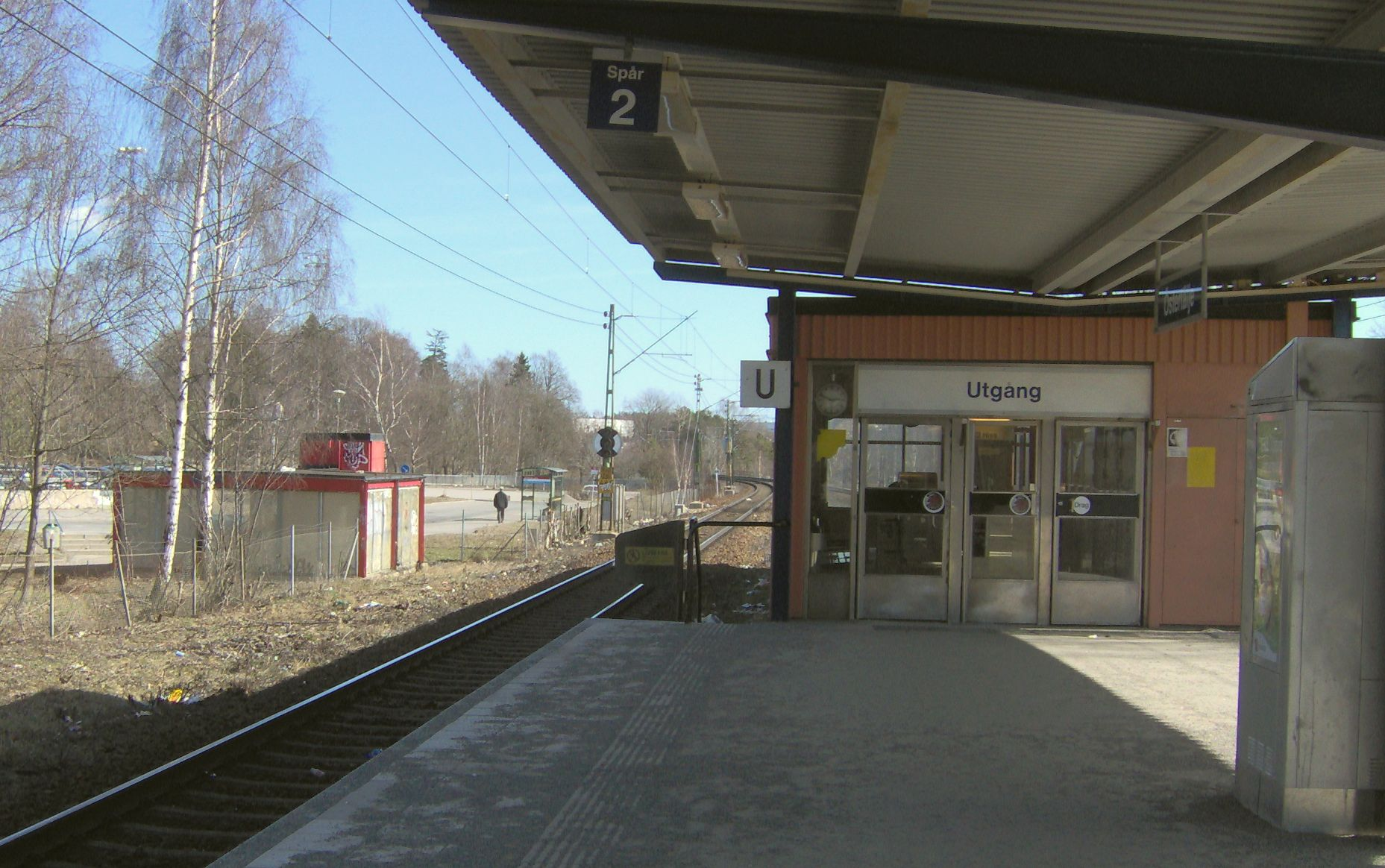 Östertälje stationsperrong 2006. Till vänster syns nedgången under spåren.